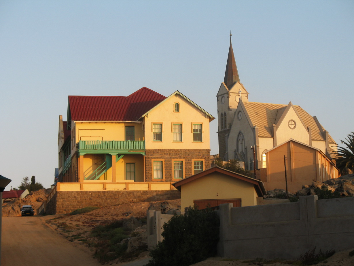 Felsenkirche, Lüderitz